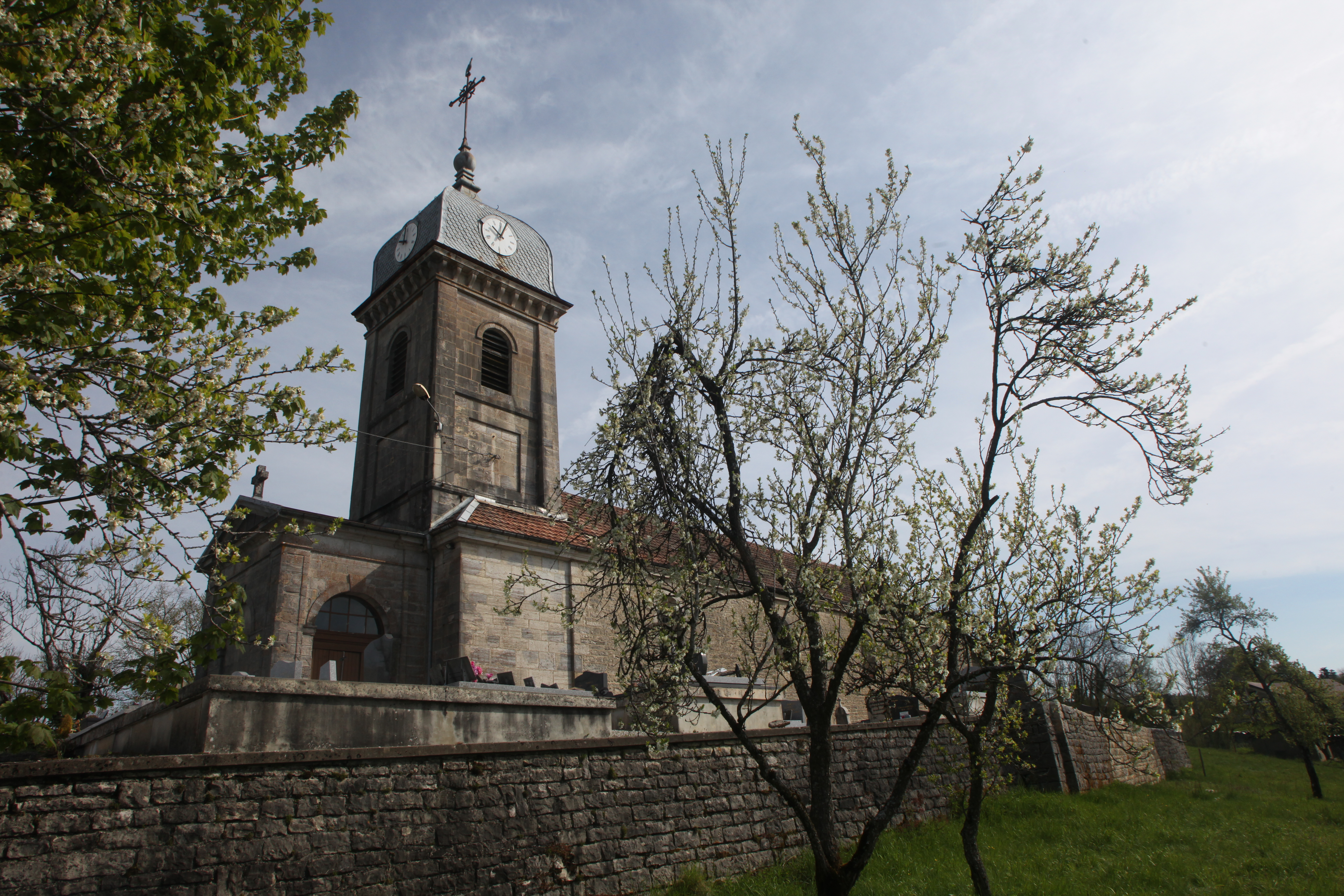 Église de Labergement-du-Navois (Doubs).